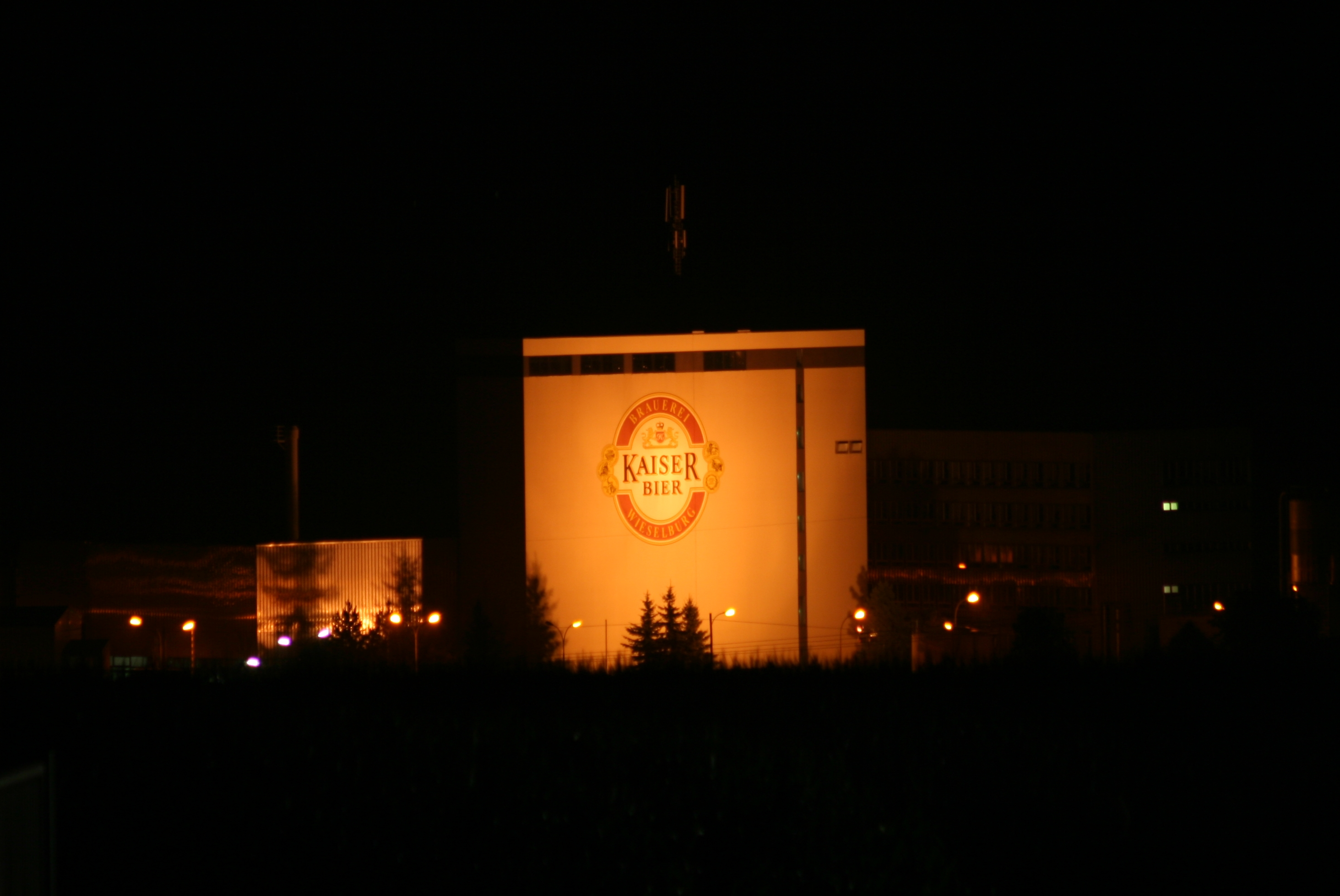 Wieselburg's brewery by night